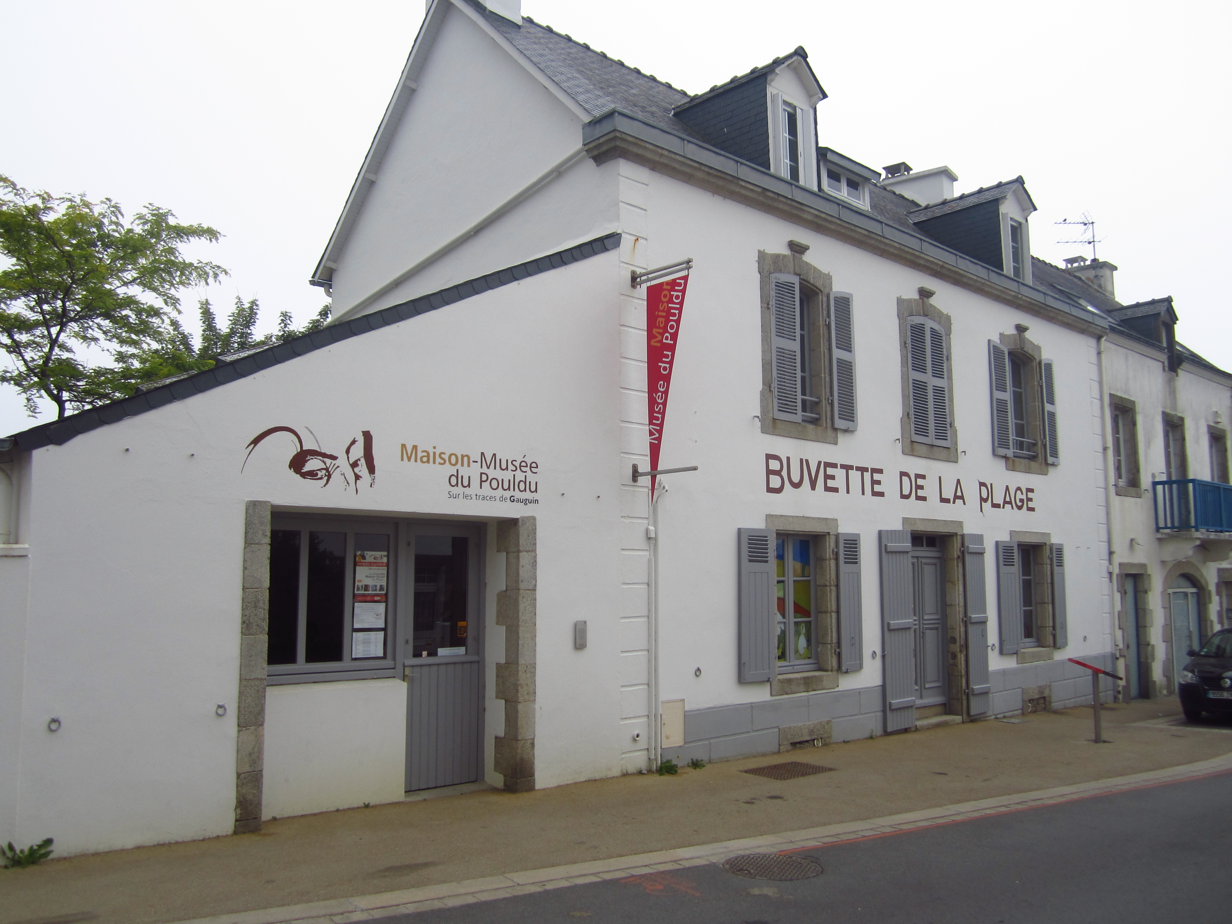 La Maison-Musée du Pouldu et la Buvette de la Plage (appelée aussi Auberge de Marie Henry), Le Pouldu, Clohars-Carnoët, Finistère